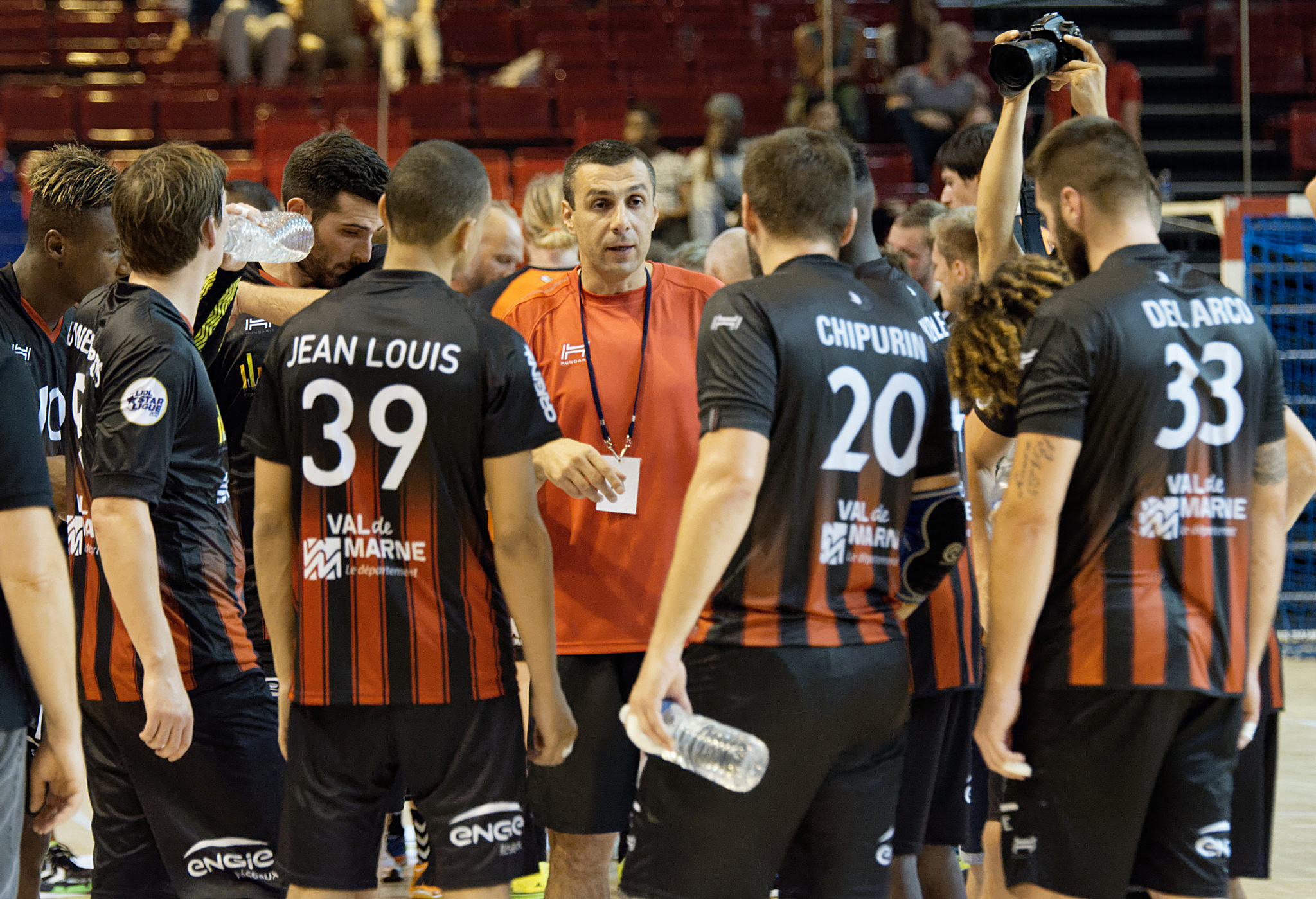 Rencontre du challenge Marrane 2016 entre l'US Ivry et les danois de IFK Kristianstad. A la Halle Carpentier (Paris 13e), le 04 septembre 2016.